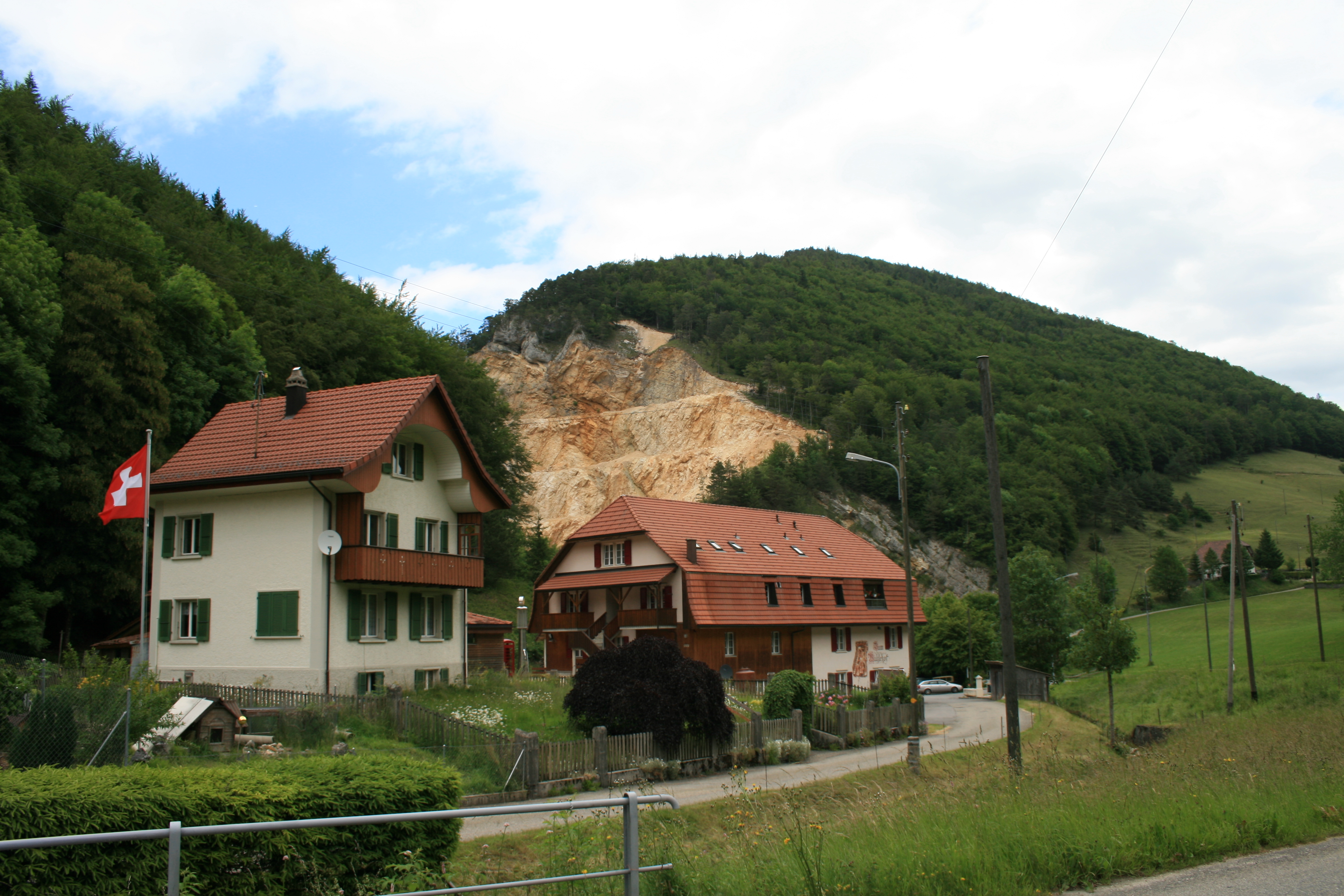 Gänsbrunnen SO, Schweiz